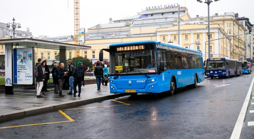 Автобус маршрута м10 в Москве, являющийся частью маршрутной сети «Магистраль».